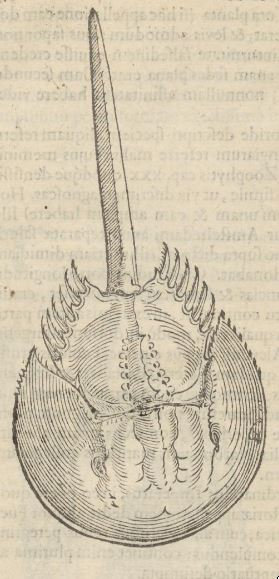 Cancer Moluccanum (Molukkenkrebs)